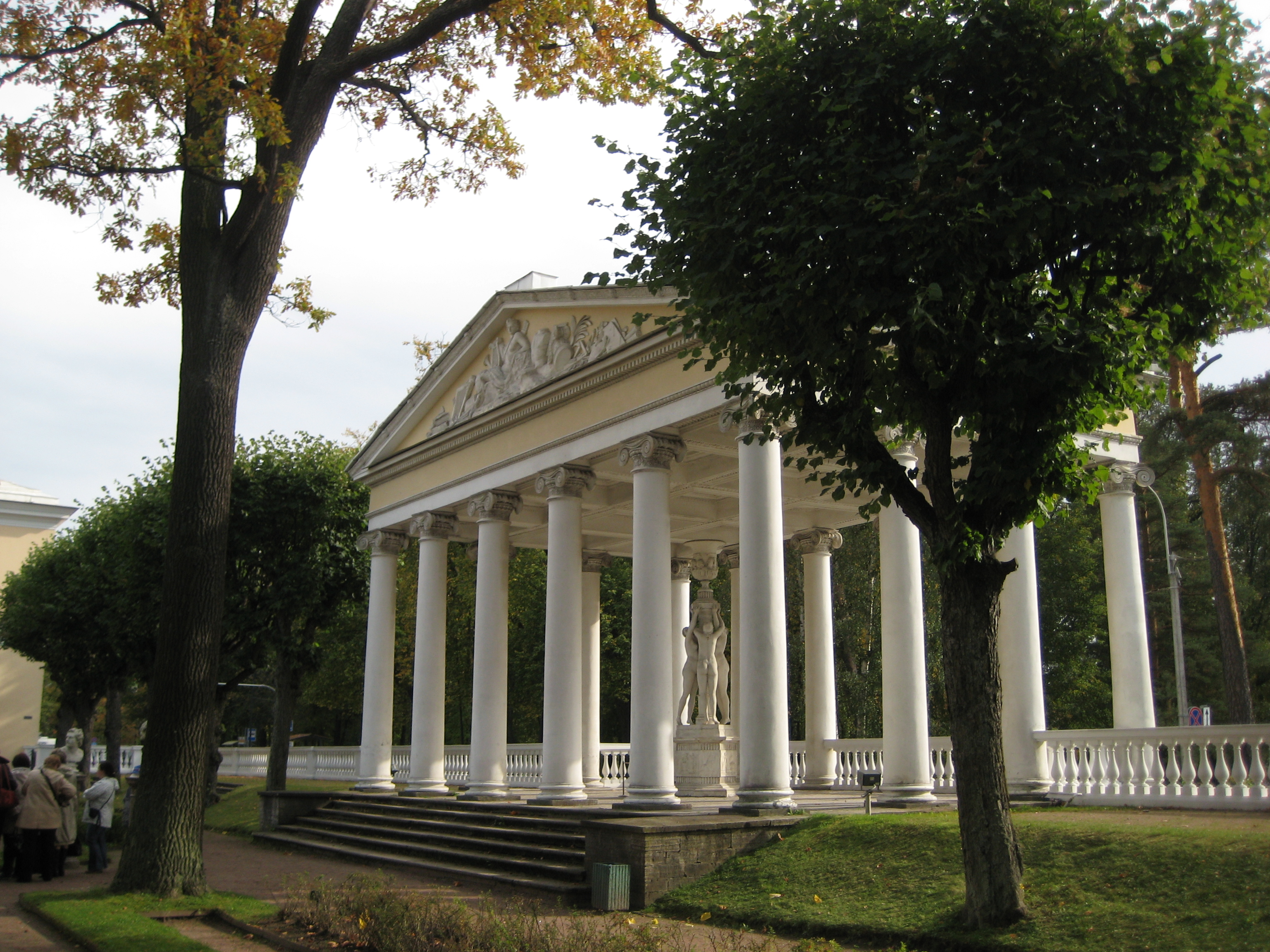 Павловский парк. Собственный сад. Павильон "Трёх Граций"